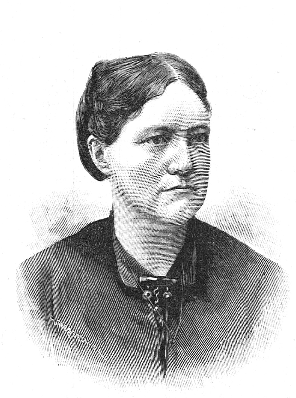 Carolina Gällstedt-Kronmann (1839-1902)